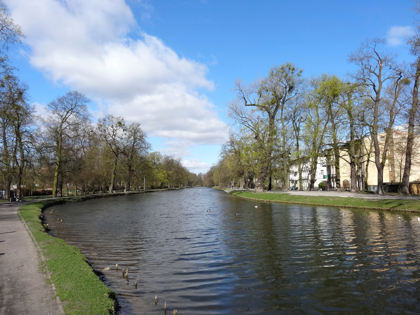 Planty nad Kanałem Bydgoskim